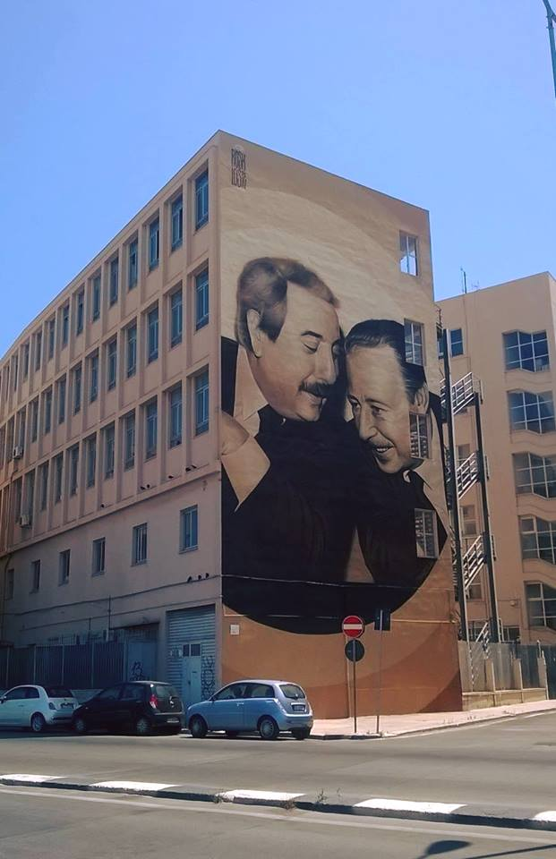 L'opera di street art realizzata a Palermo da Rosk & Loste